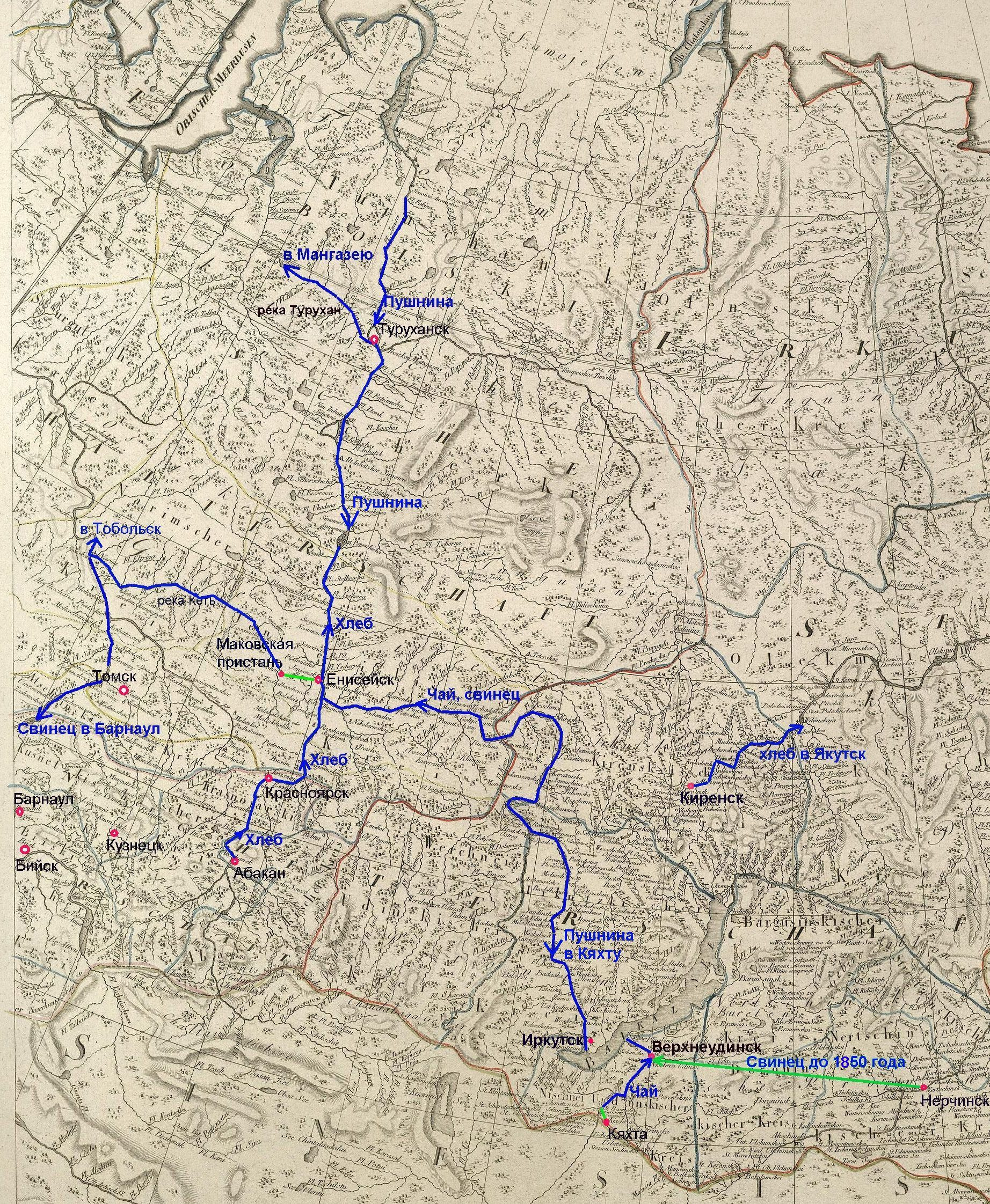 Карта: история судоходства на Енисее в XVII - XIX веке